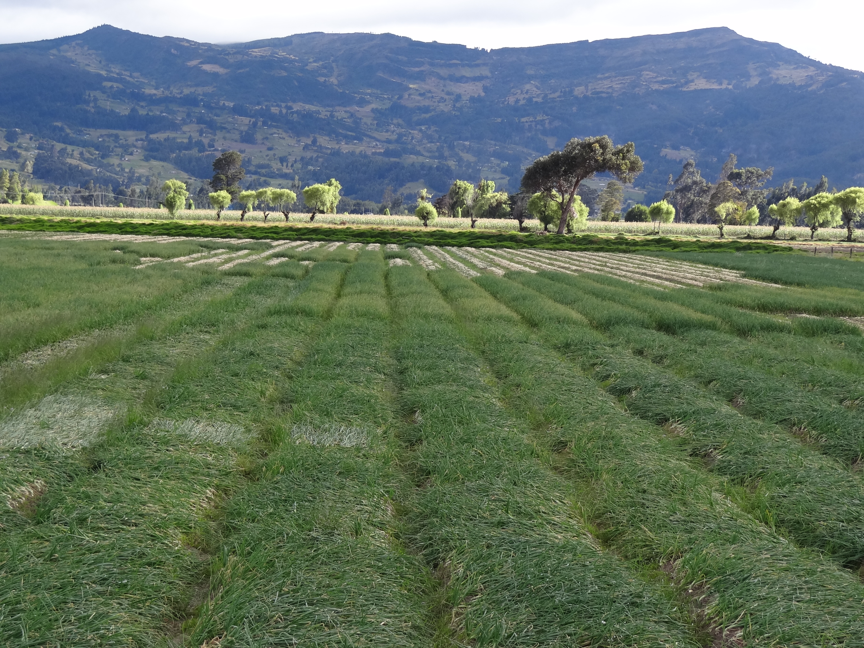 Cultivo de cebolla cabezona (Allium cepa) en el área rural del municipio de Samacá, departamento de Boyacá, Colombia